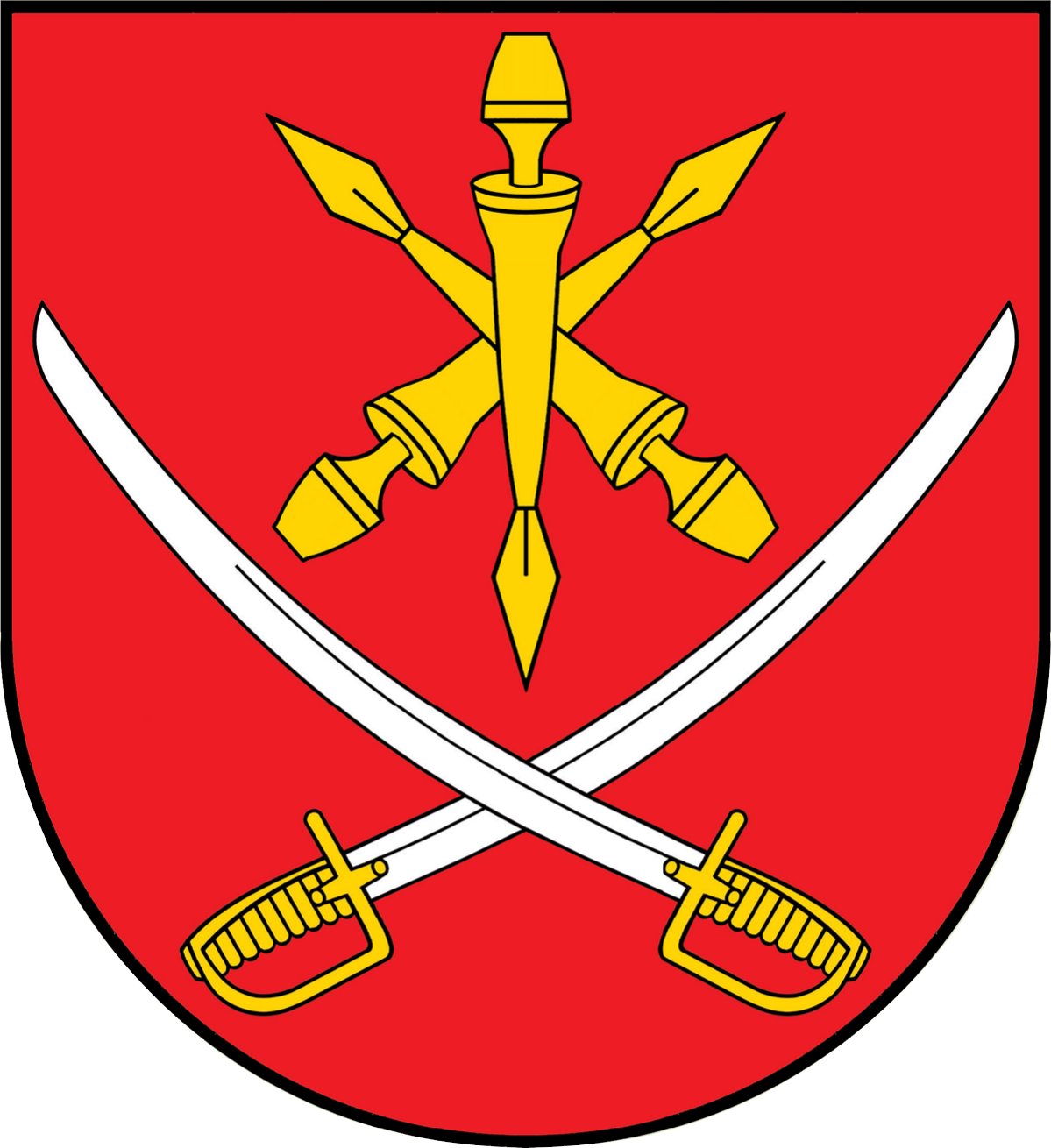 Herb gminy Batorz